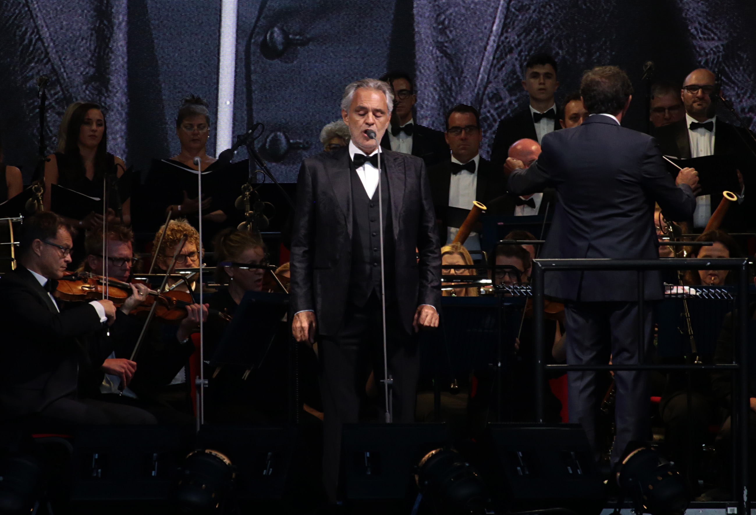 Andrea Bocelli con la Royal Philharmonic Concert Orchestra, dirigida por Marcello Rota. Al fondo, The Gibraltar Choir Collective, que acompañó a Bocelli durante todo el concierto.